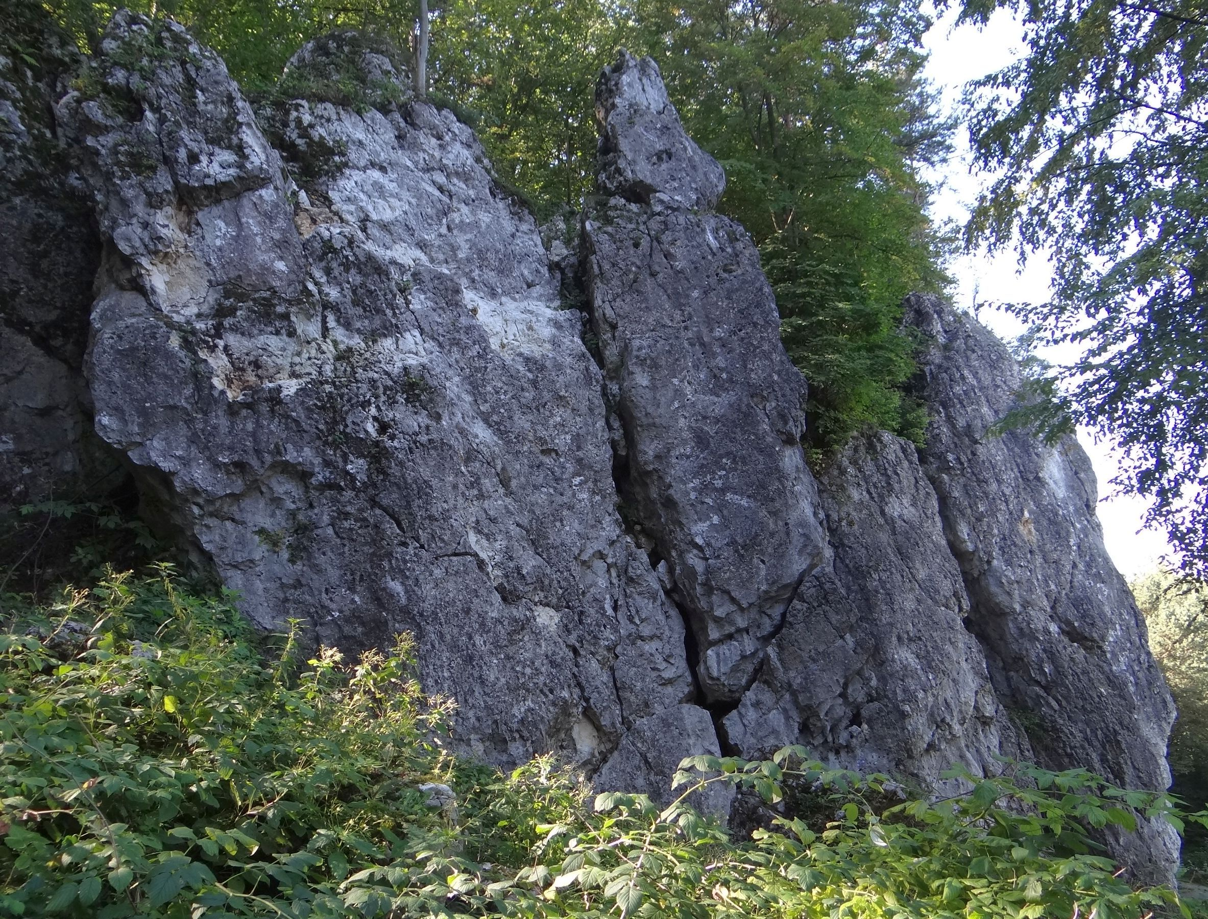 Nawratilowa i Mniszkowa w grupie Łabajowej (Dolina Będkowska)